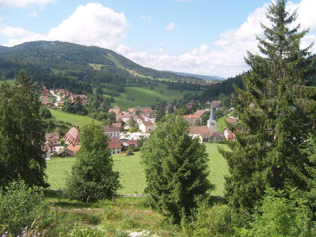 Vue générale des Hôpitaux-Neufs (Doubs - France)